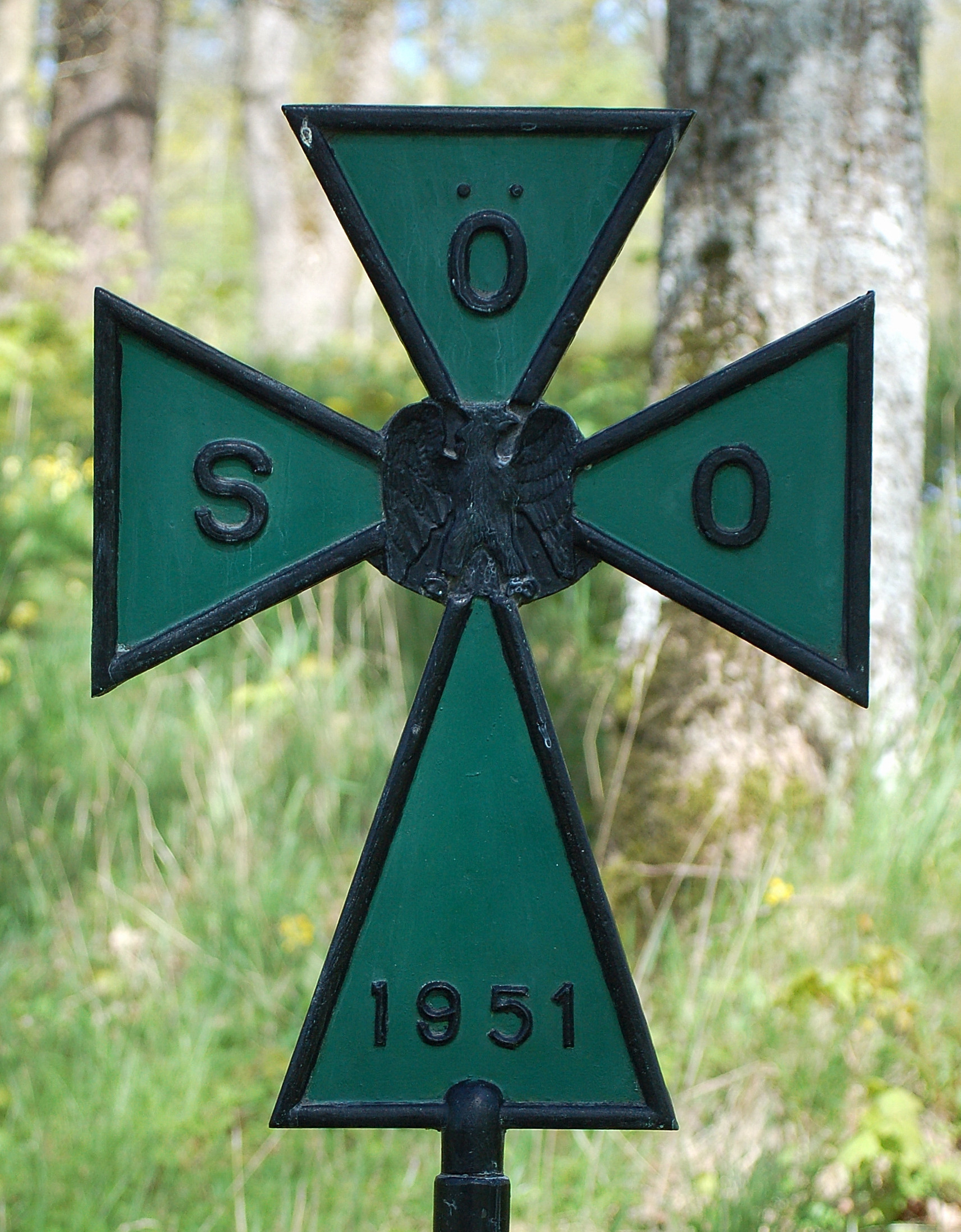 Svarta Örns Orden, korset restes 1951 vid Riseberga Kloster.